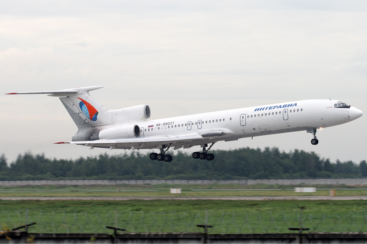 Interavia Tupolev Tu-154M